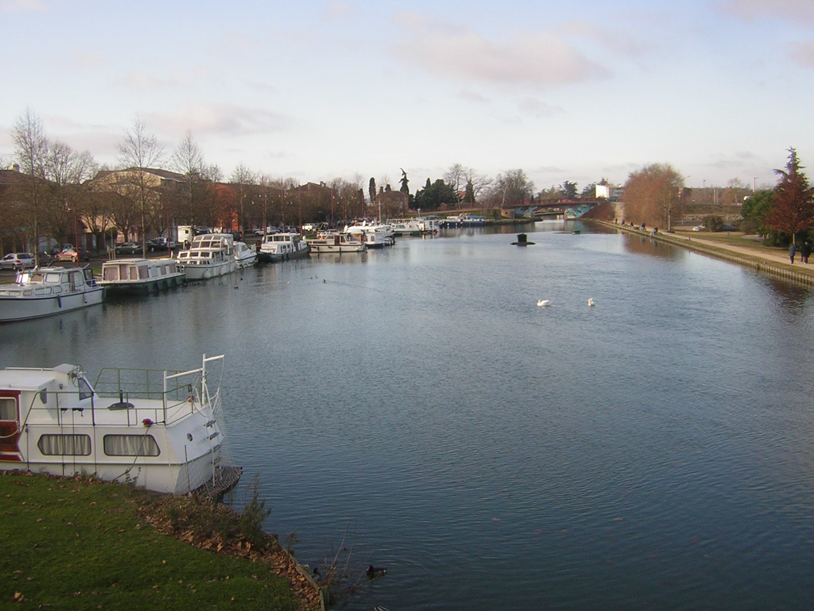 Port Jacques-Yves COusteau, Castelsarrasin